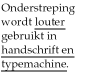 Voorbeeld van gebruik van onderstreping. Lettertype: Palatino (Eigenlijk: URW Palladio), eigen werk.